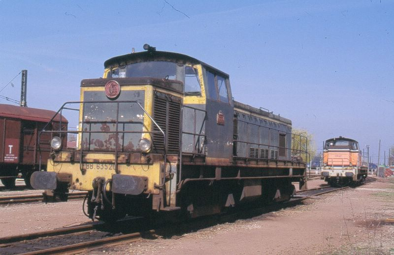 La BB 63520 au relais traction de Trappes, septembre 1999. (machine réformée en décembre 2004)